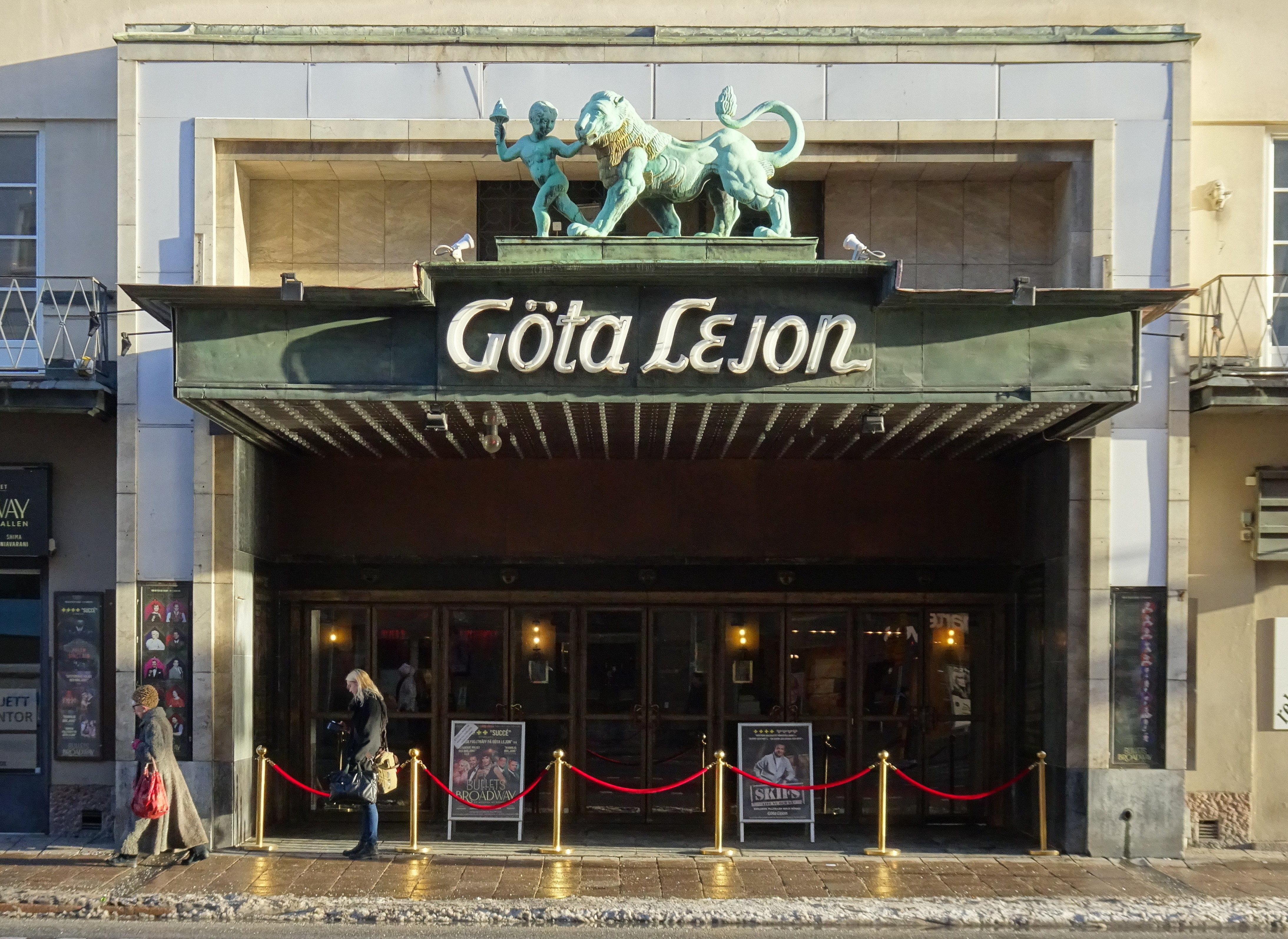 Göta Lejons entré